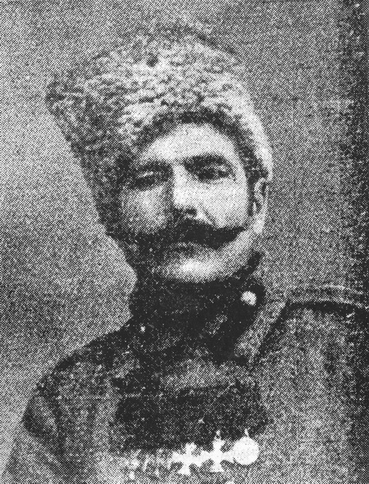 Есаул Кайгородов, один из сподвижников барона Унгерна